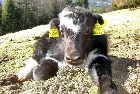 10 Tage alter Yak-Jungstier, Yakzucht Pongratz auf der Koralpe ( Steiermark, Österreich.